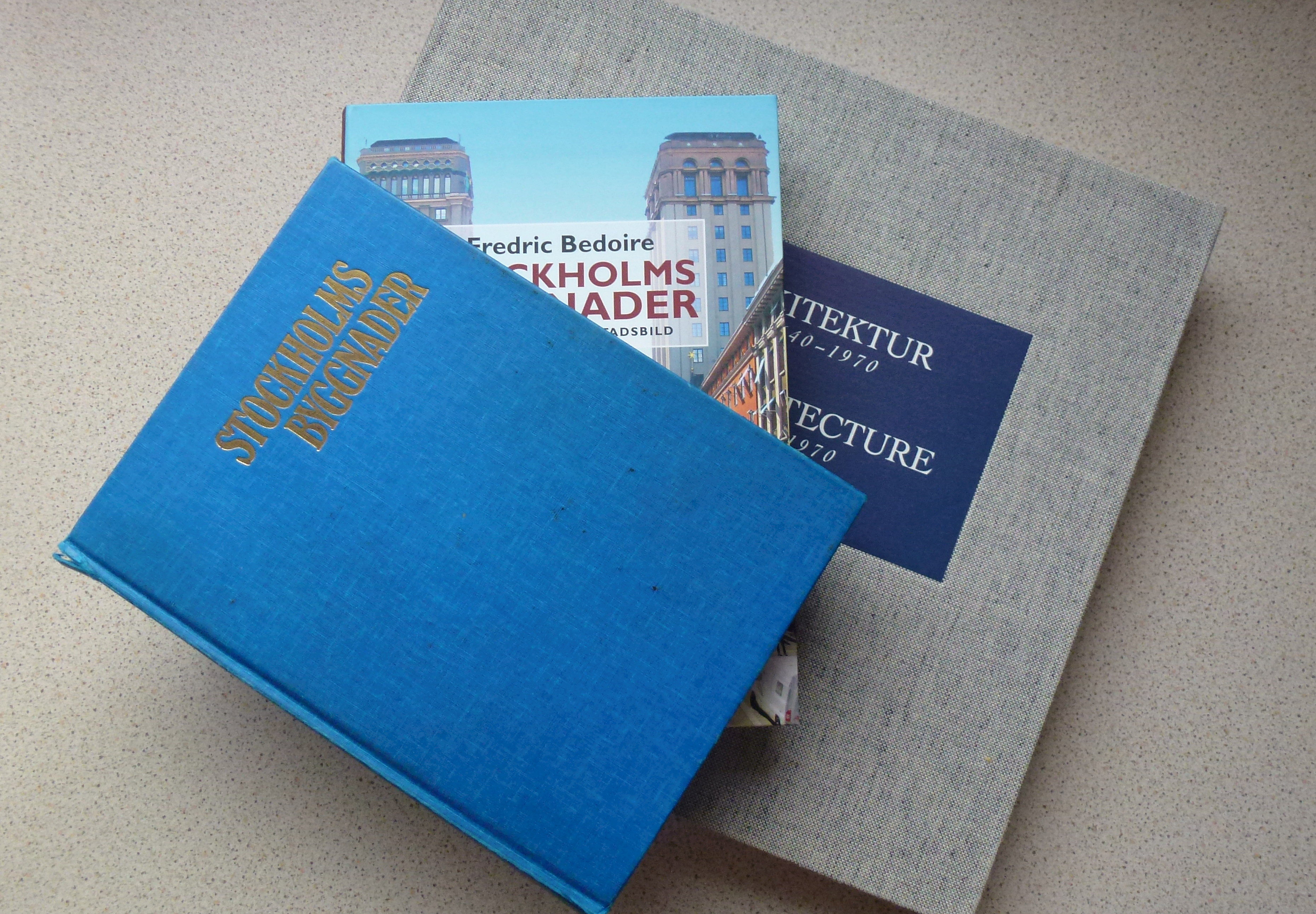 Några publikationer av arkitekturhistorikern Fredric Bedoire